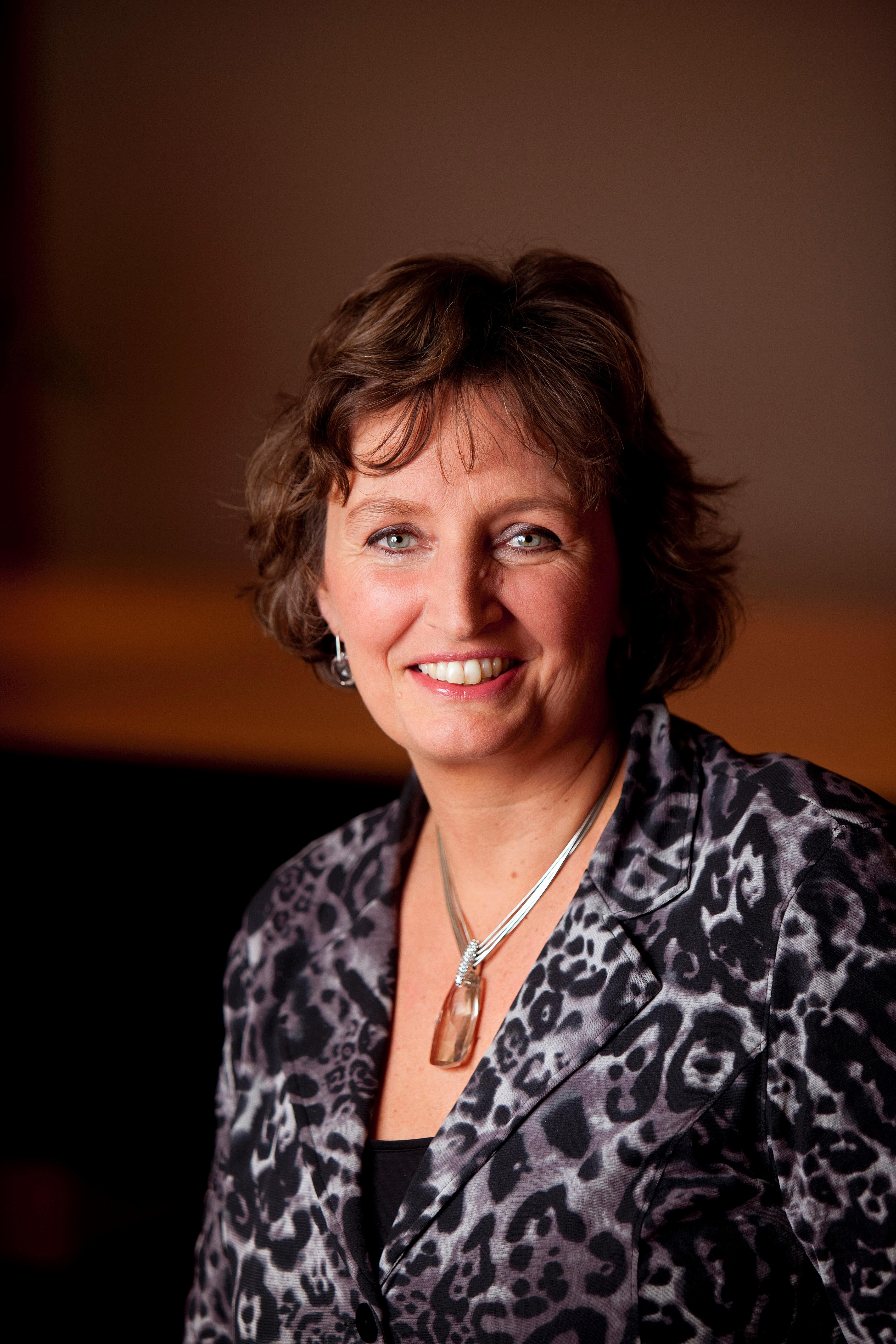 Minister van Binnenlandse Zaken en Koninkrijksrelaties Liesbeth Spies